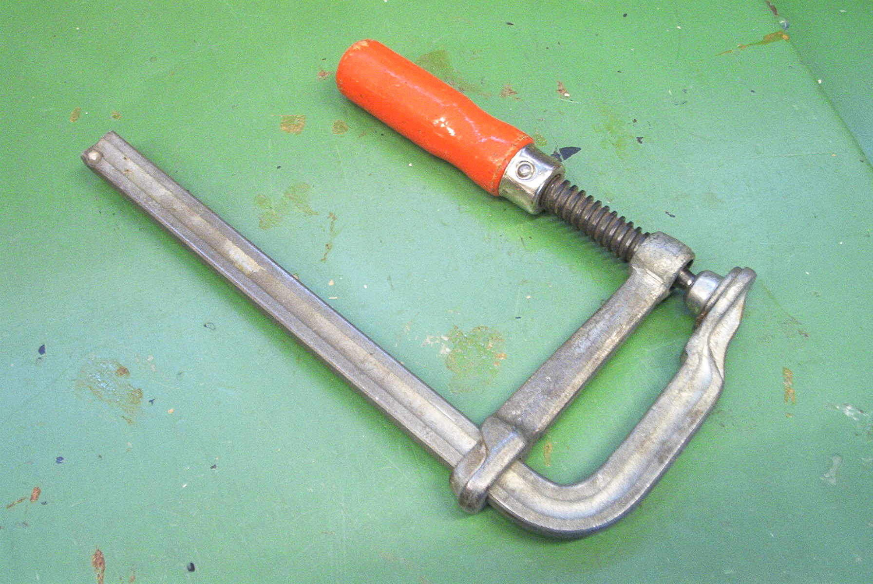 zelf gemaakte foto voor publiek domein. Martink